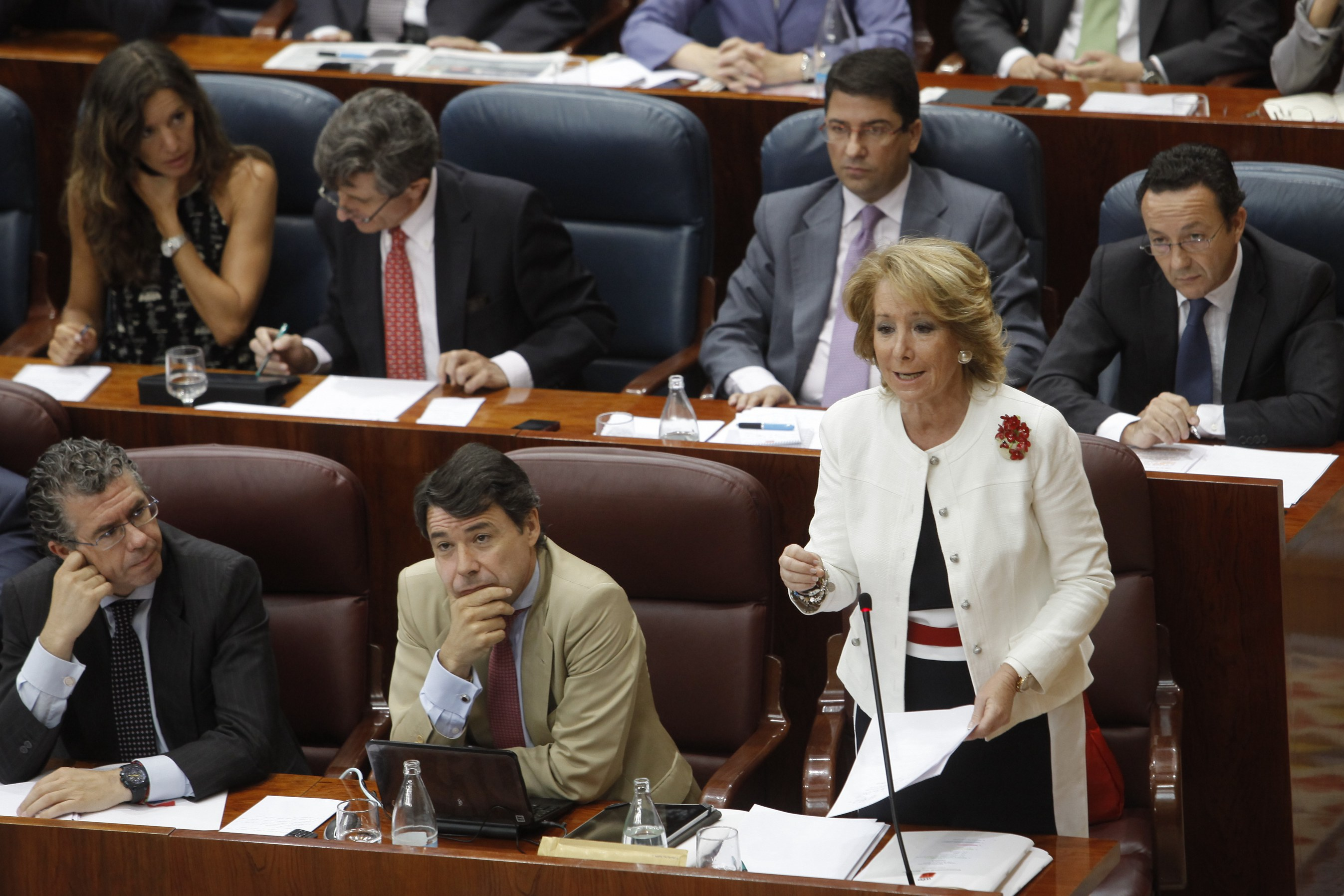 Segunda sesión del debate de investidura de Esperanza Aguirre